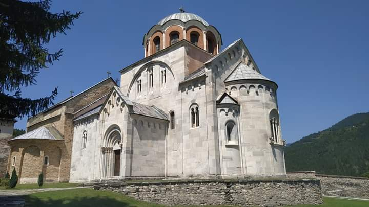 Klášter Studenica